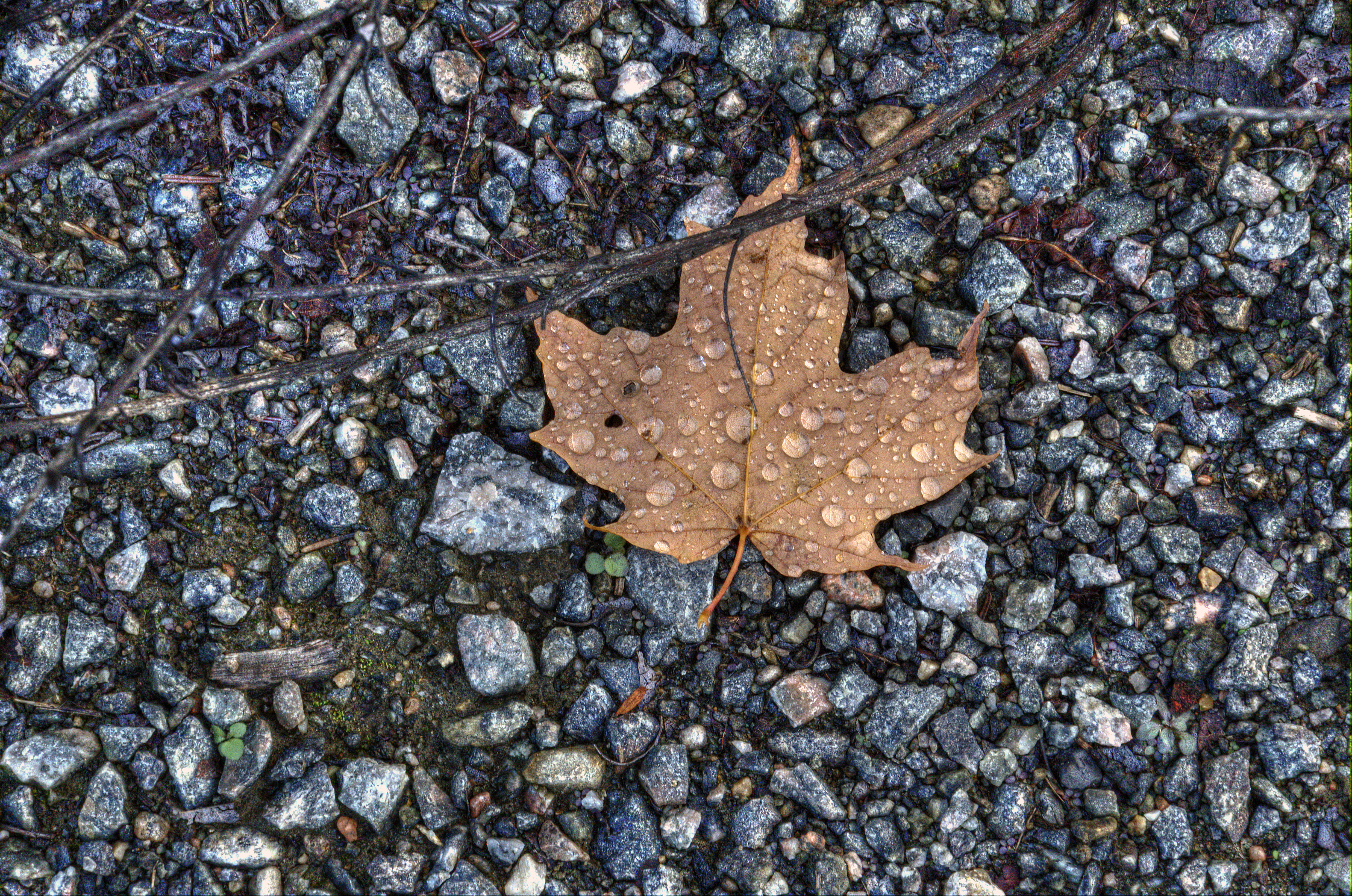 L'automne au Québec